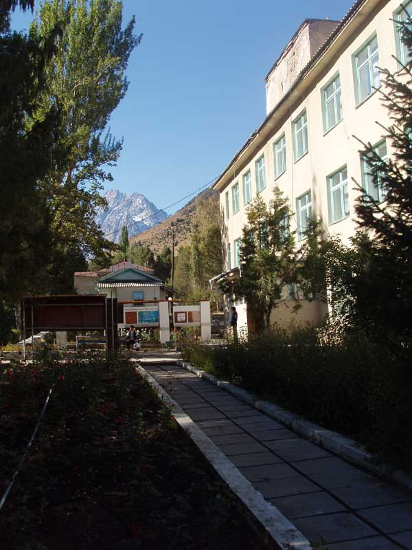 Лечебный корпус